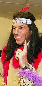 Politiker Jörg Haider, Fasching (=Karneval) Februar 2006 in Velden, Kärnten, Österreich